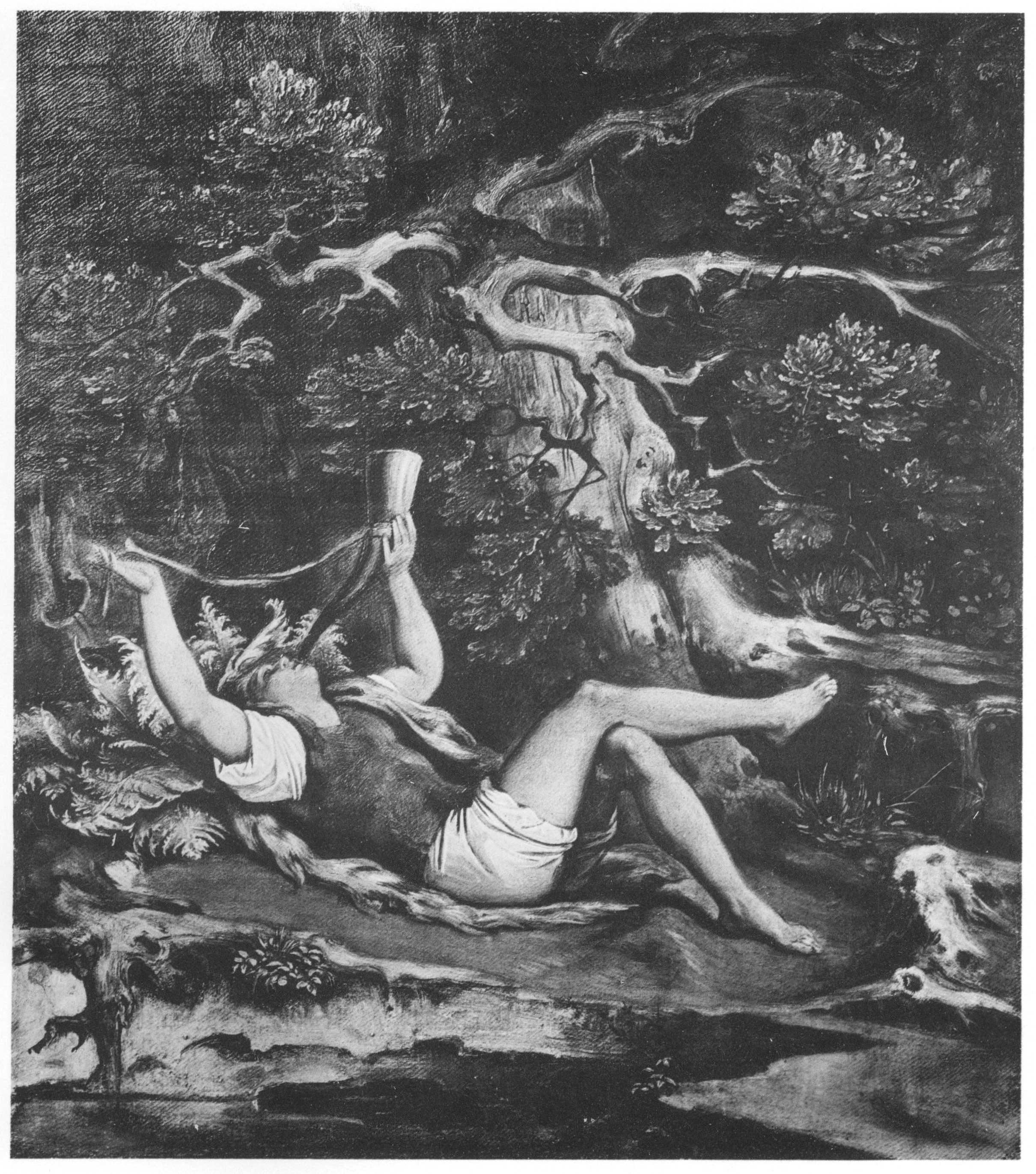 Erste Fassung